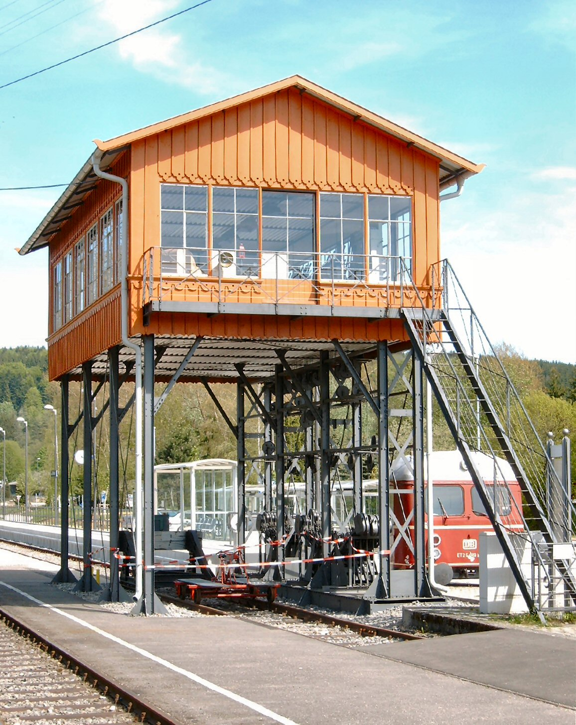 Reiterstellwerk des Bahnhofes Konstanz. Wiederaufgebaut am Bahnhof Blumberg der Museumsbahn Wutachtalbahn.